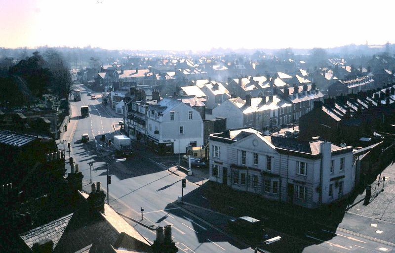 Picture 004